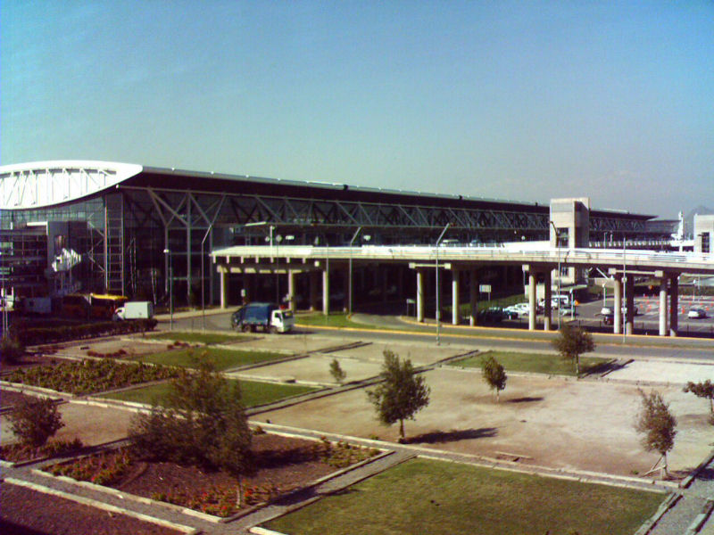 Aeropuerto Internacional Comodoro Arturo Merino Benítez